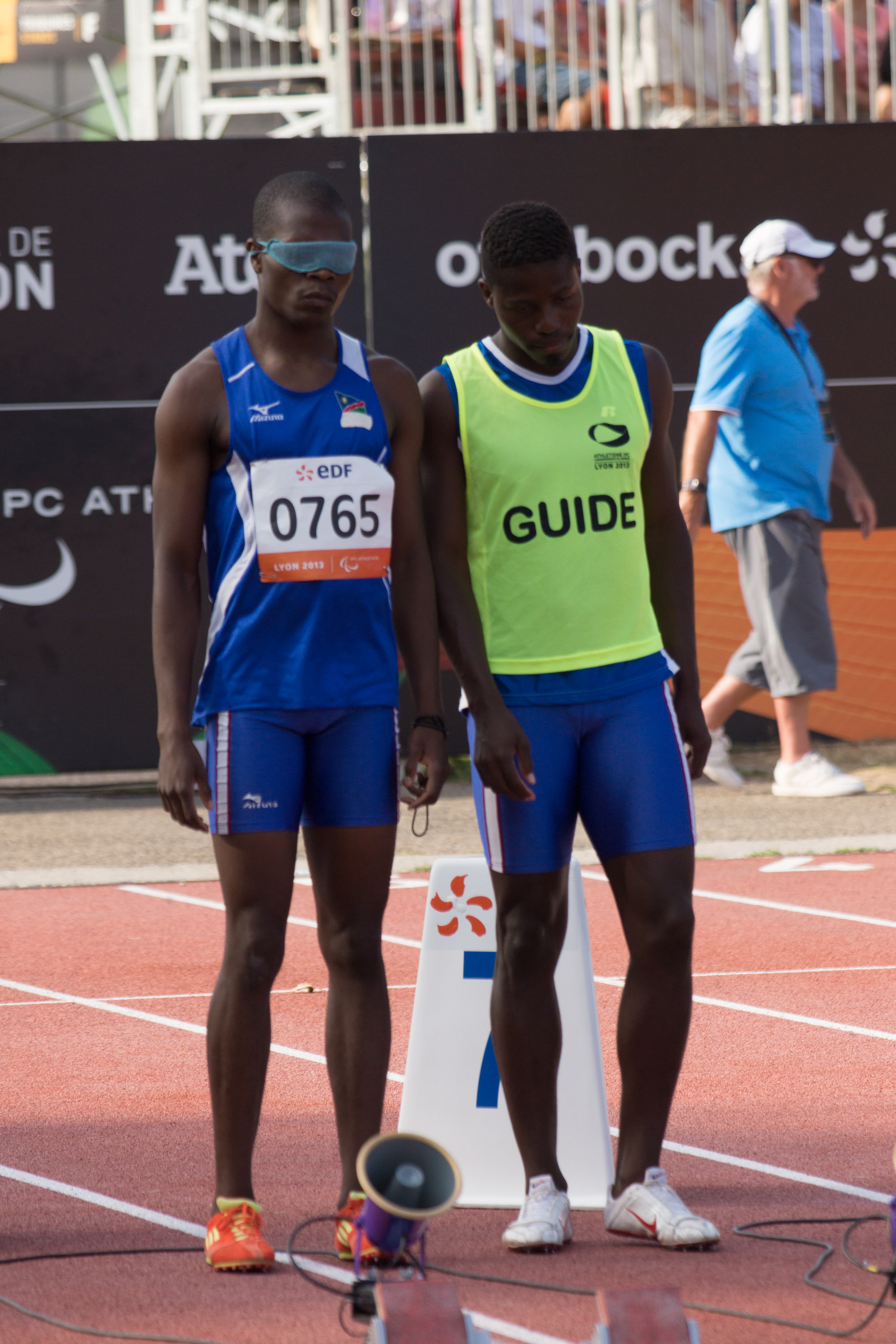 Championnats du monde d'athlétisme handisport 2013. 100 mètres masculin T11.